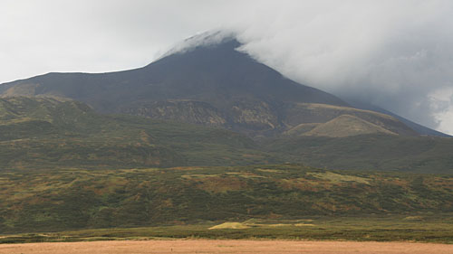 Вулкан Сарычева на острове Матуа